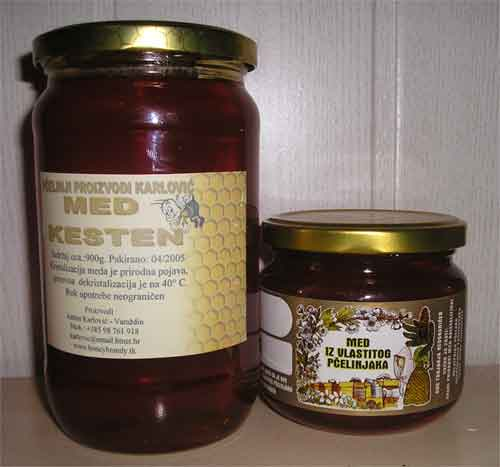 Med kesten